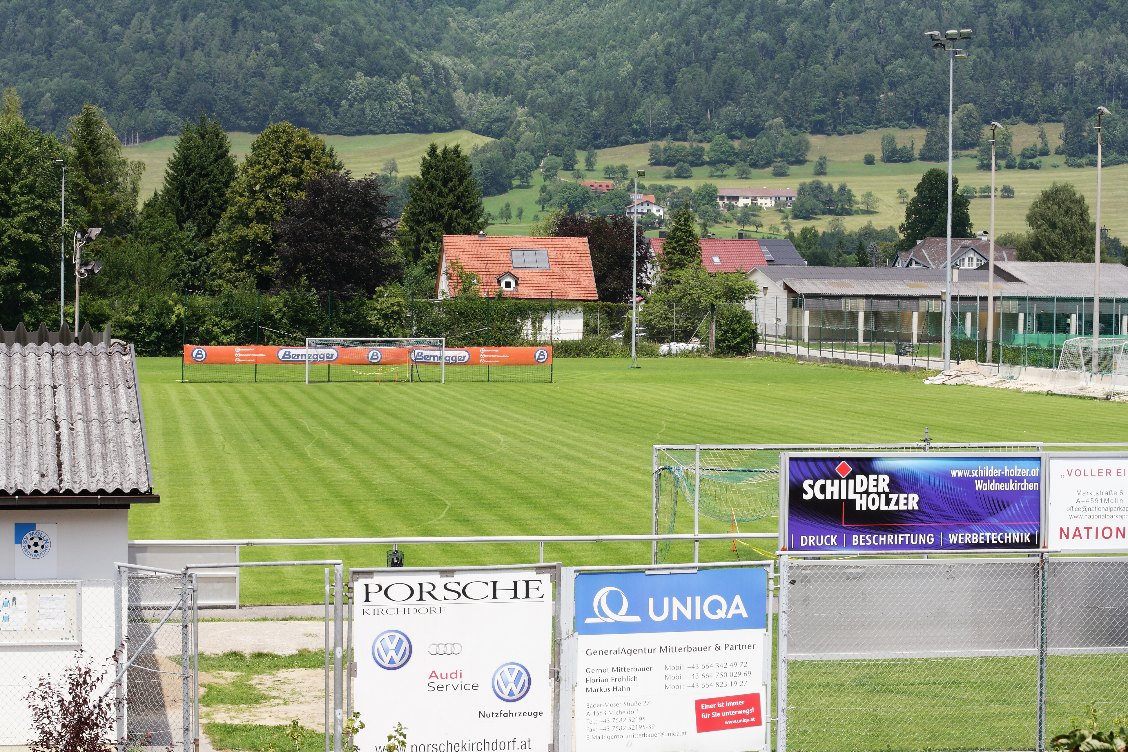 Der Sportplatz in Molln (Oberösterreich), Schaufelhackerstraße 161/2